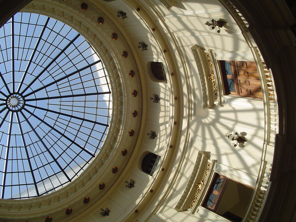 cupula do ccbb: a foto meio óbvia ;-)